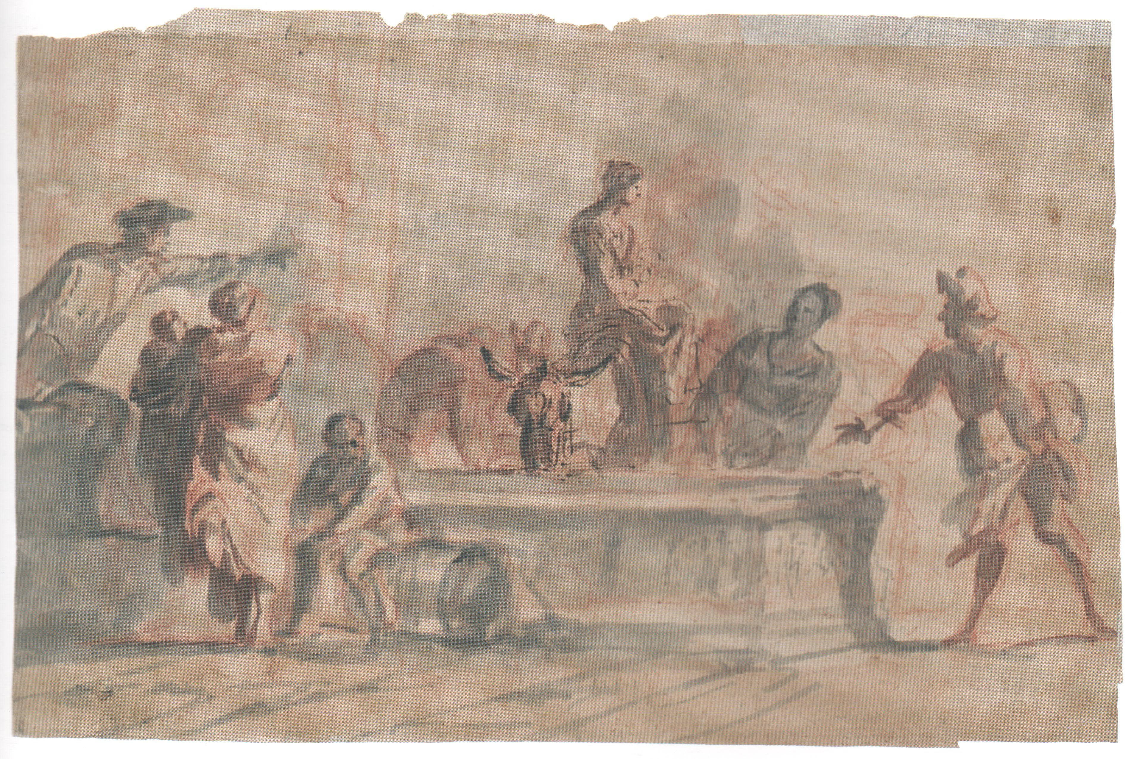 Kabinet grafika HAZU